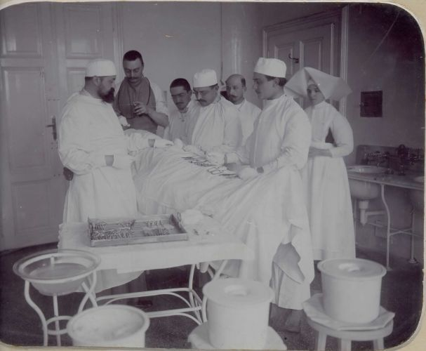 Zdravniško osebje pri operaciji